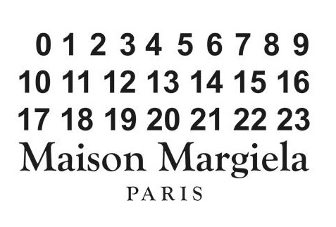 Maison Margiela corporate logo